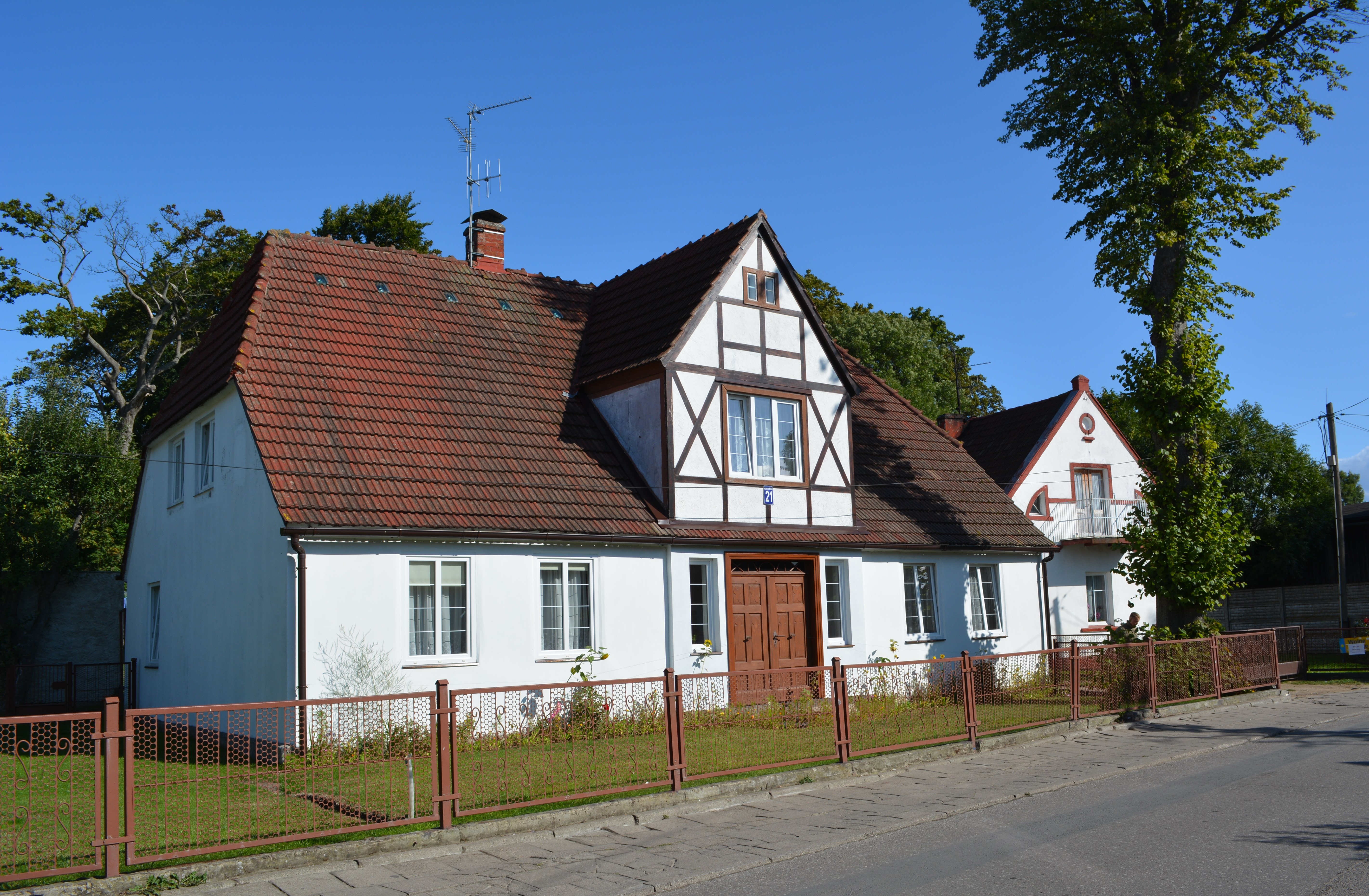 Fachwerkhaus in der Kapitanka-Straße in Chlopy, Gemeinde Mielno, KreisKoszalin